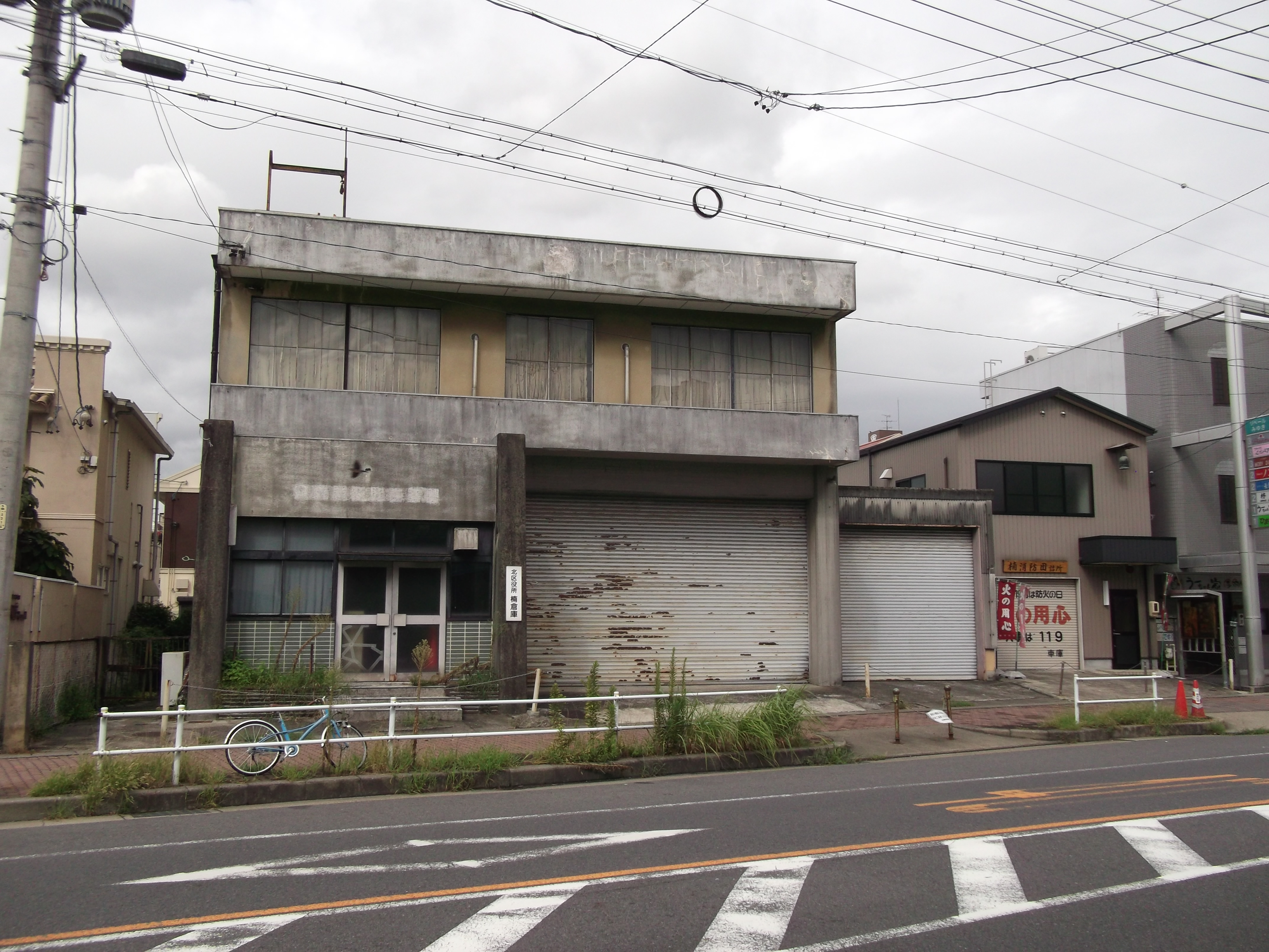 名古屋市北区にある旧名古屋市消防局北消防署楠出張所